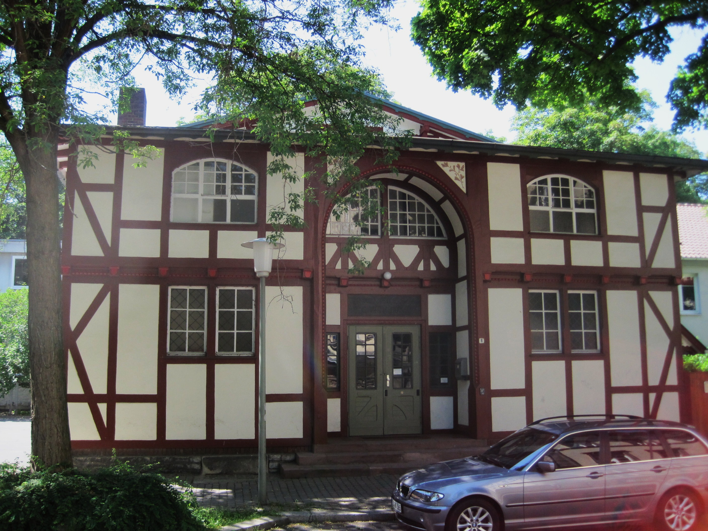 Alte Universitätsturn- und fechthalle in der Geiststr. 6 in Göttingen (Bj. 1903)